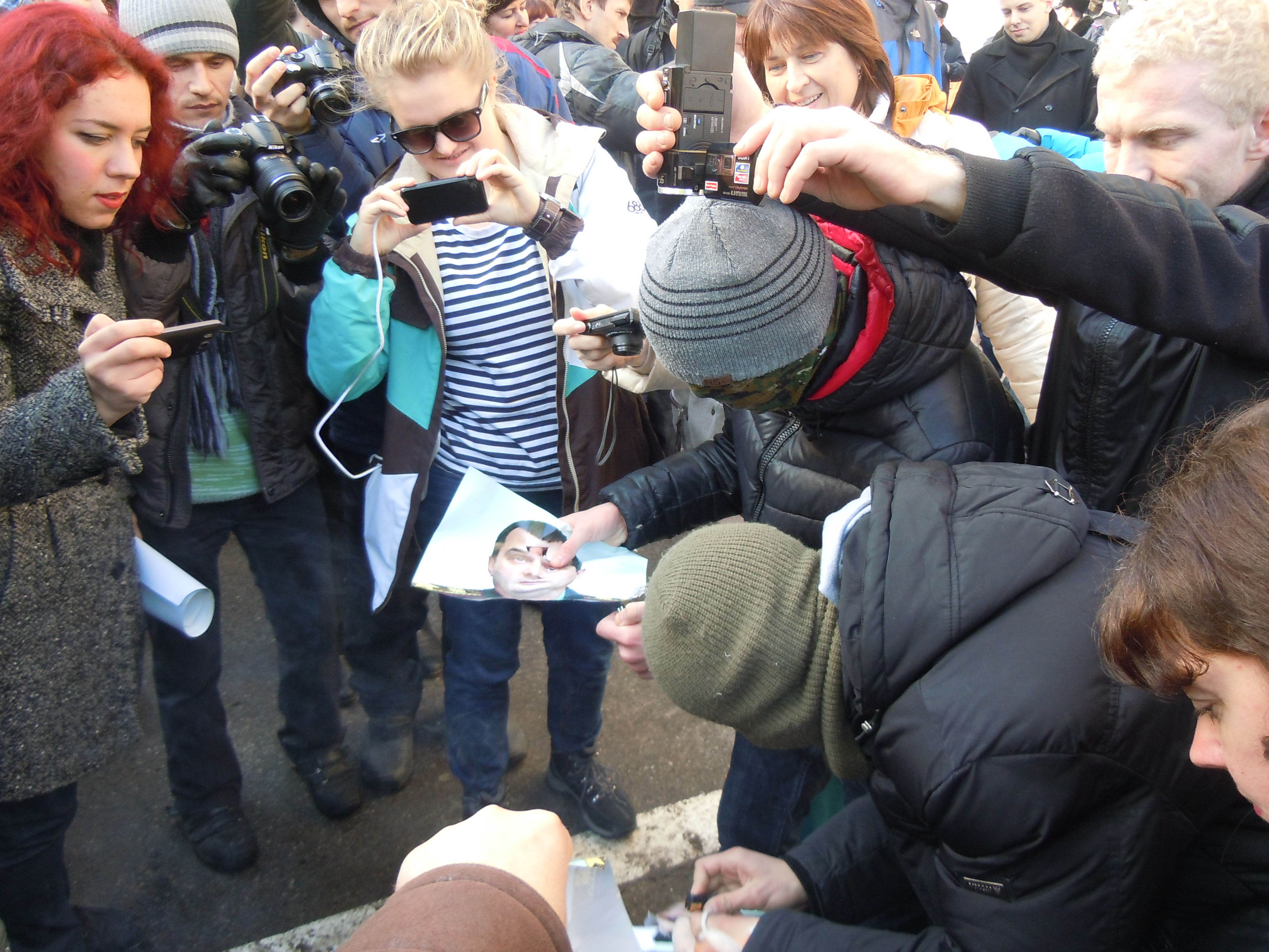 "Марш западенців", Одеса. Спалення портрету Міністра Внутрішніх Справ України, Віталія Захарченко, під час пікету Обласного управління МВС в Одеській області.